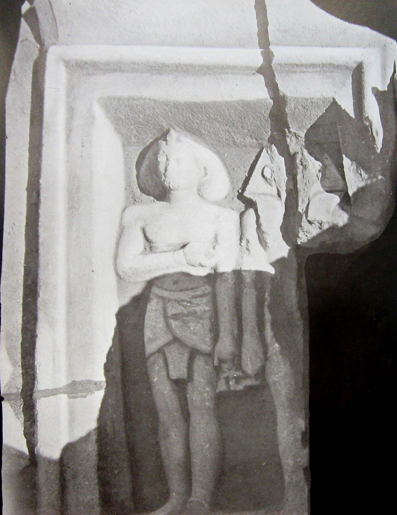 Vestige du labyrinthe de Hawara